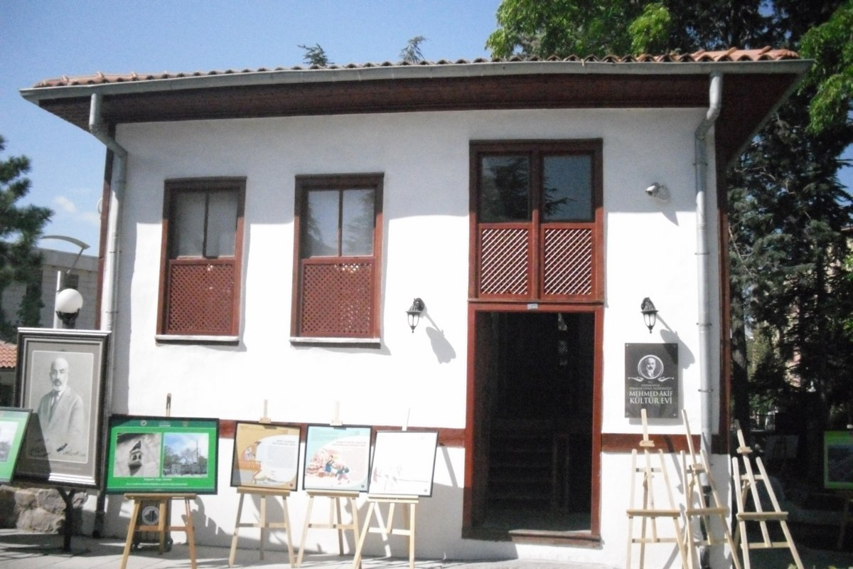 Mehmet Âkif Ersoy müze evi